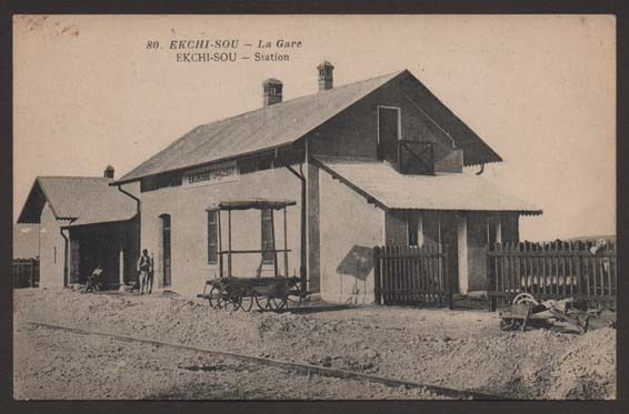 Гарата в Екши Су през Първата световна война.